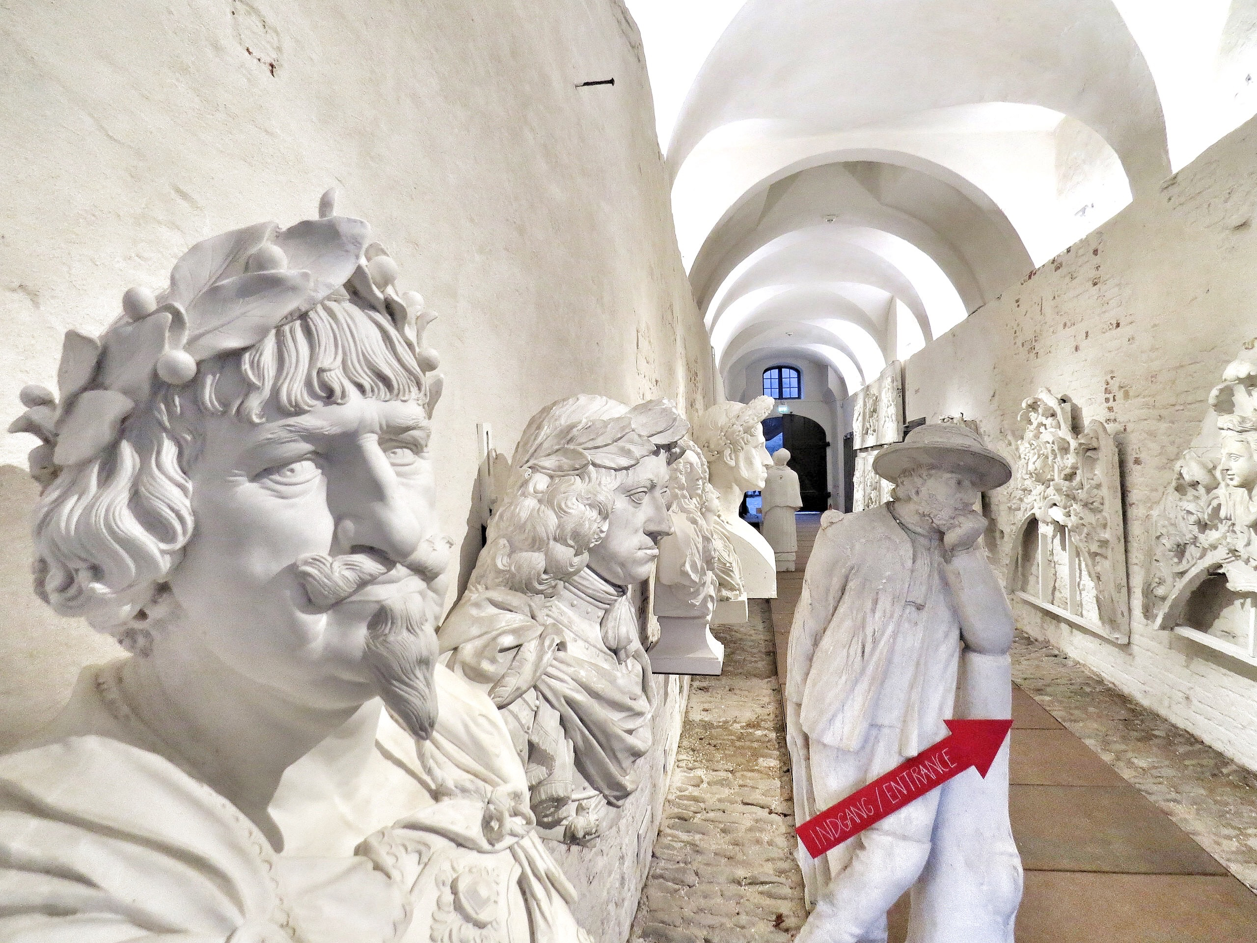 Kongebuster m.m. ved indgangen til Kongernes Lapidarium, København